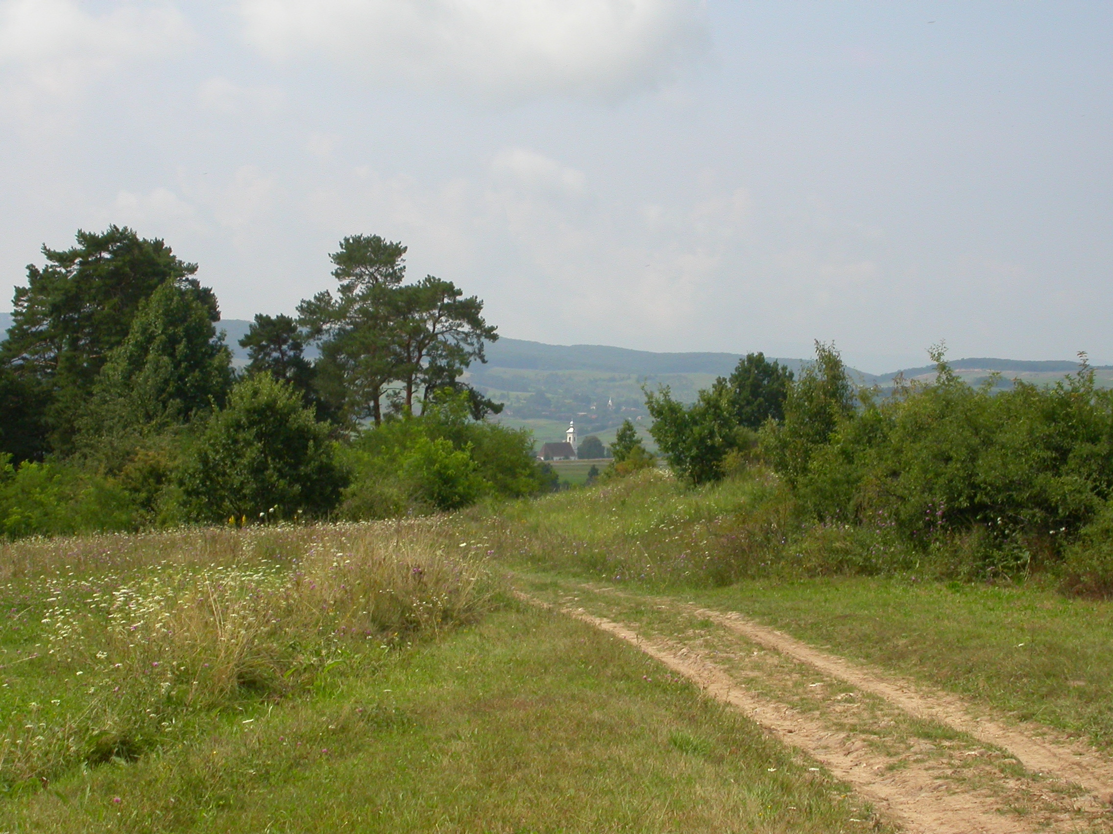 Biserica reformată, sec. XV, transf. 1679, 1798-1801